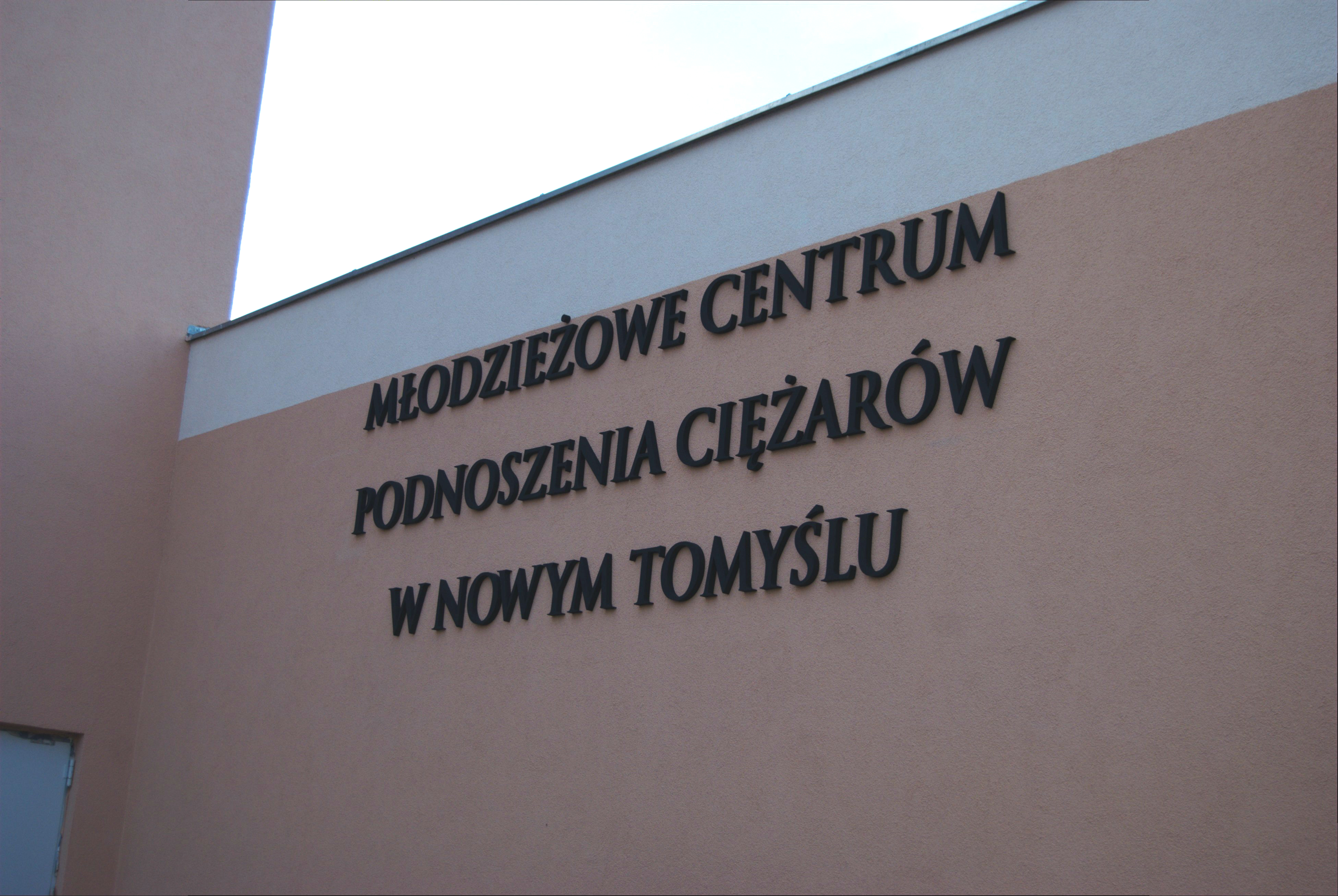 zdjęcie przedstawia Młodzieżowe Centrum Podnoszenia Ciężarów w Nowym Tomyślu, w którym ćwiczą sportowcy Kluby Sportowego Budowlani Nowy Tomyśl - sekcja podnoszenia ciężarów